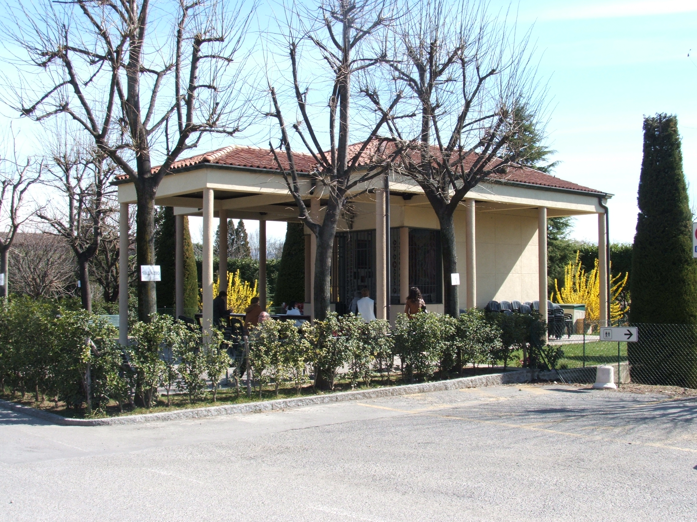 Bonate Sopra (BG) - Oratorio della Madonna delle Ghiaie